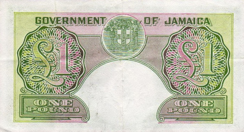 1 fontos jegy hátoldala.